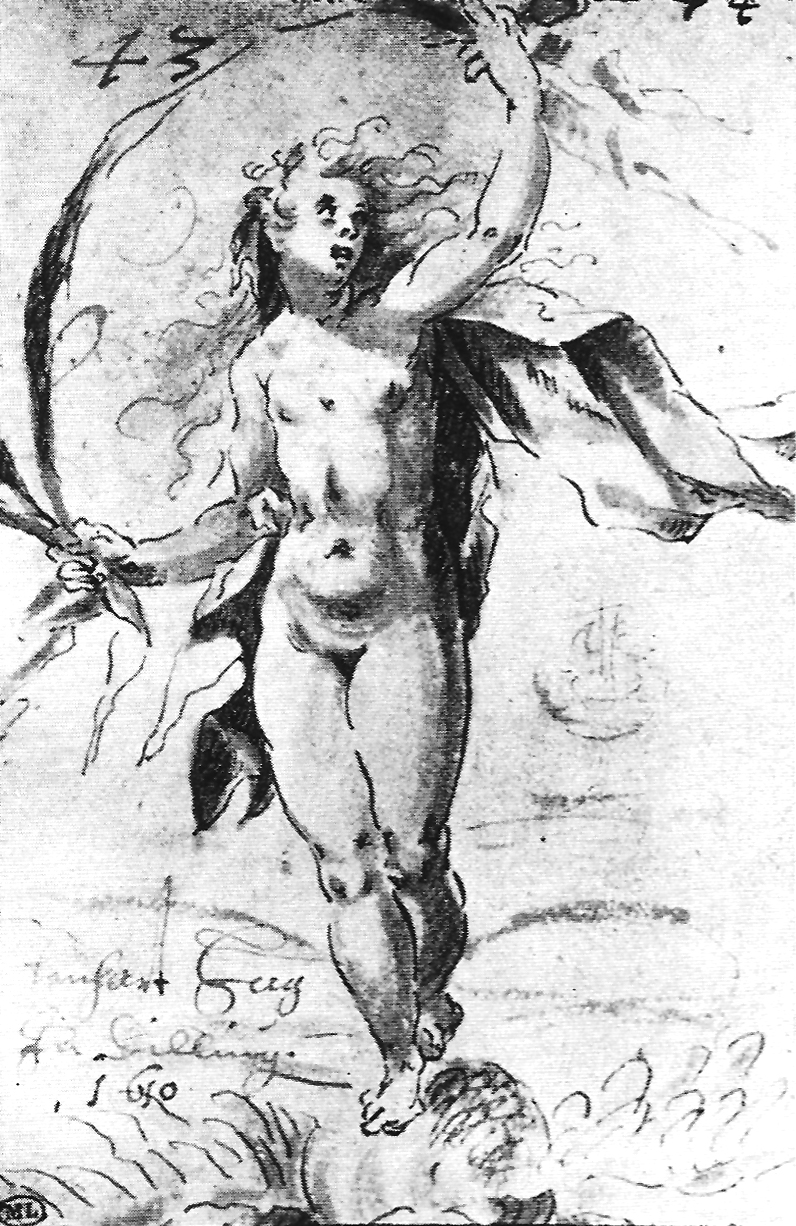 Fortuna (Federzeichnung aus einem Stammbuch, grau laviert, 14,0×9,3 cm; Louvre Paris, Inv. 19.252)